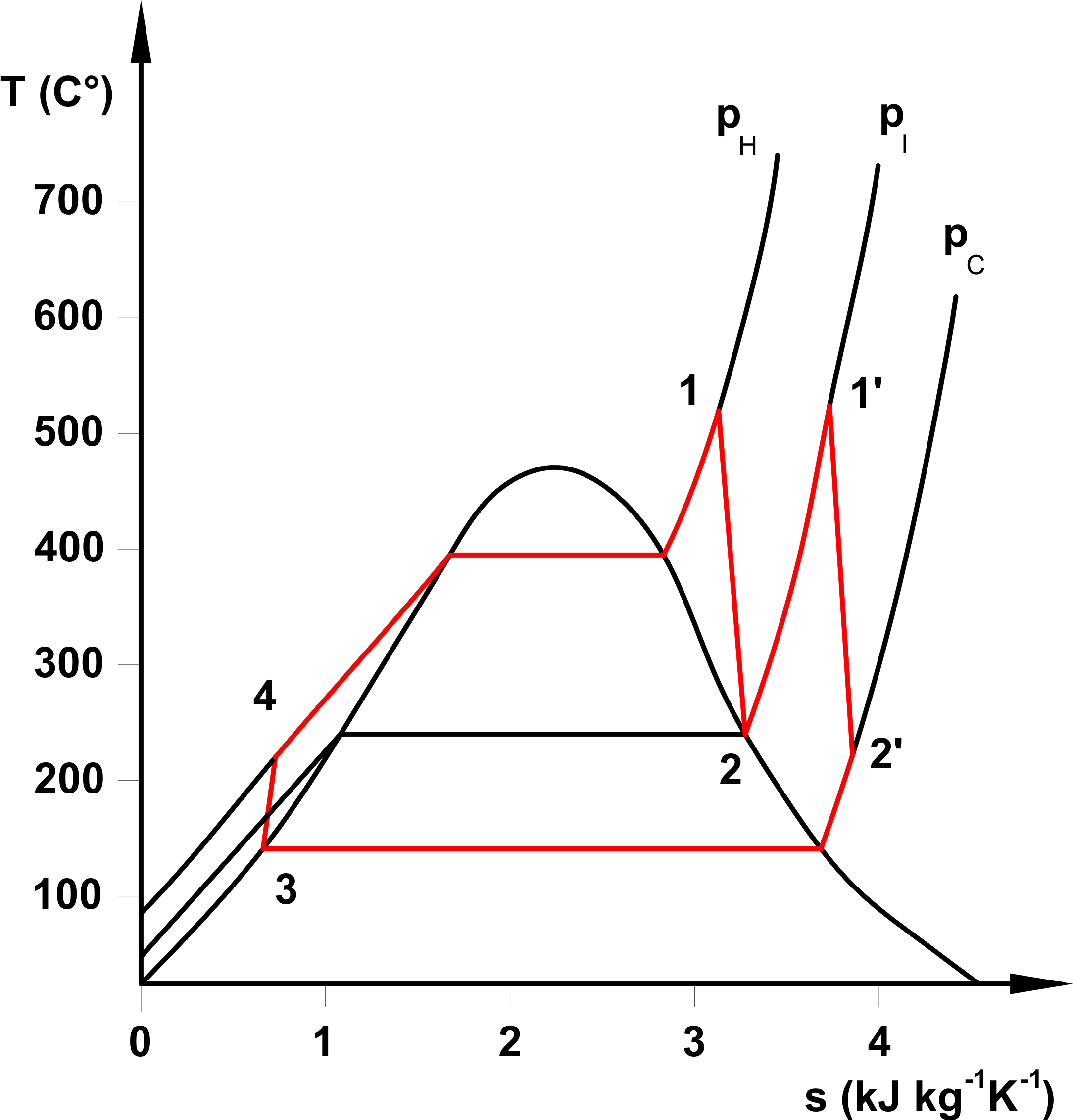 Újratúlhevítés-módosított Rankine-körfolyamat T-s diagramja.